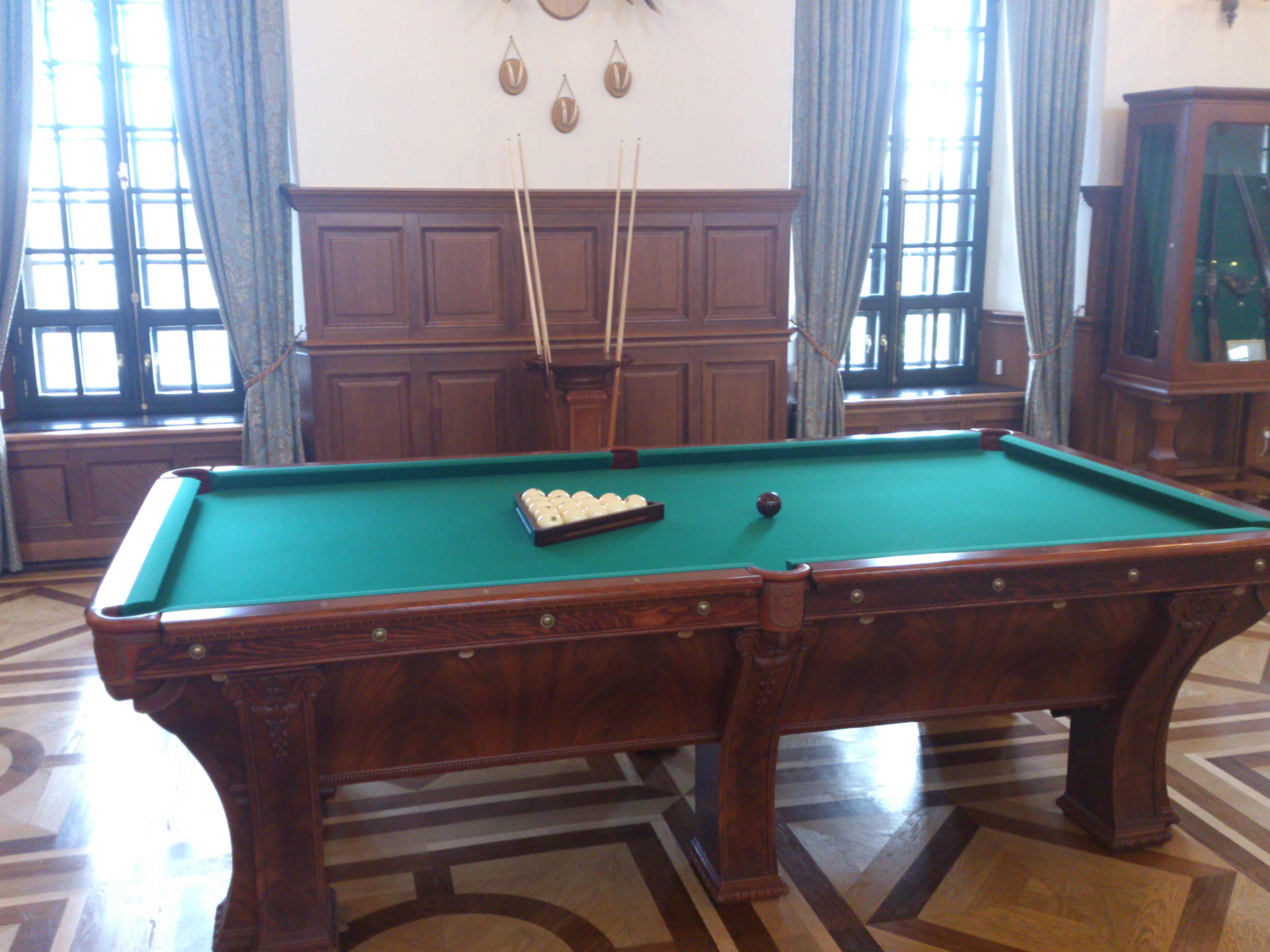 Архитектурный, жилой и культурный комплекс рода Радзивиллов в городе Несвиж